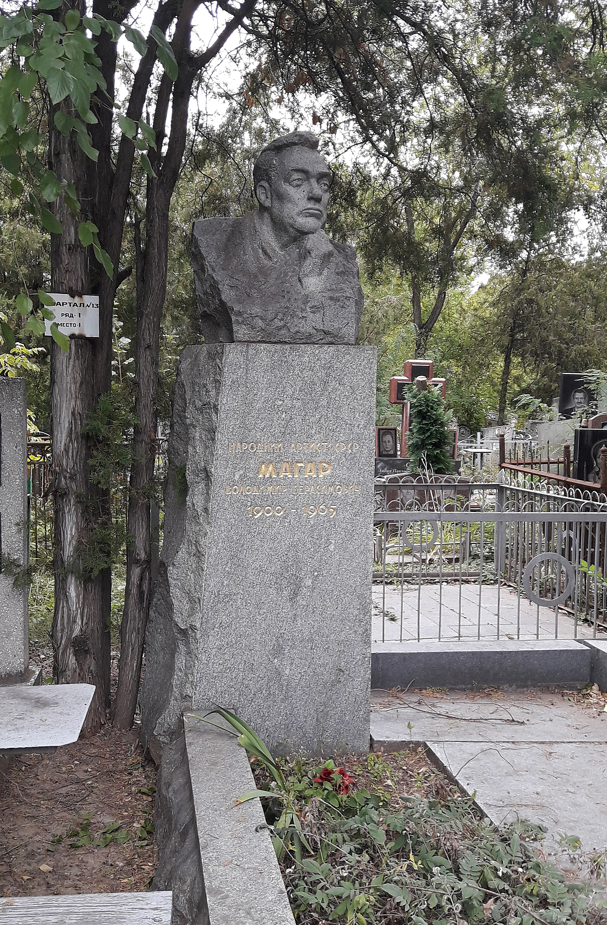 Могила Магара В.Г. - народного артиста СРСР, Запоріжжя, вул. Київська, Південне кладовище